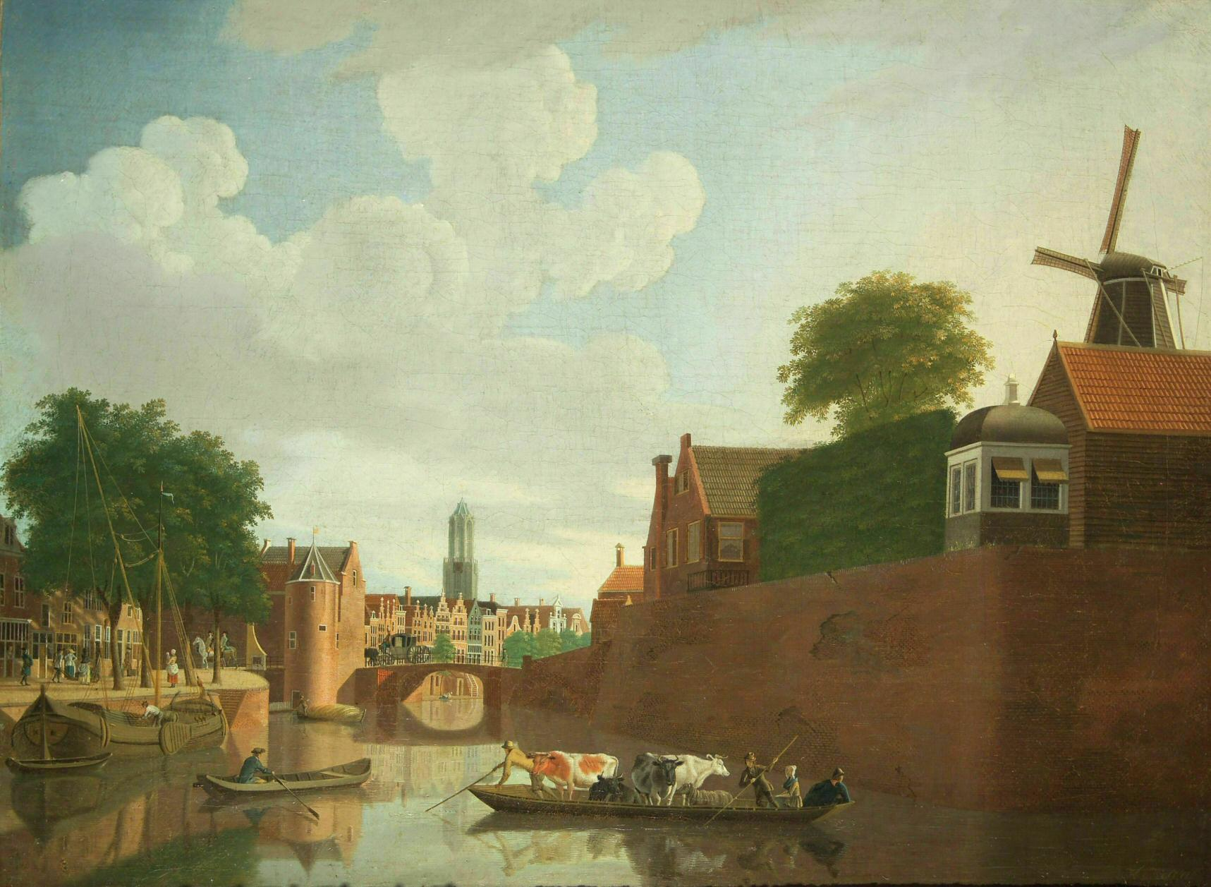 Schilderij met in het noorden van de stad Utrecht bolwerk Morgenster met oa Weerdpoort en Zandbrug. Collectie Arjan den Boer, Utrecht.